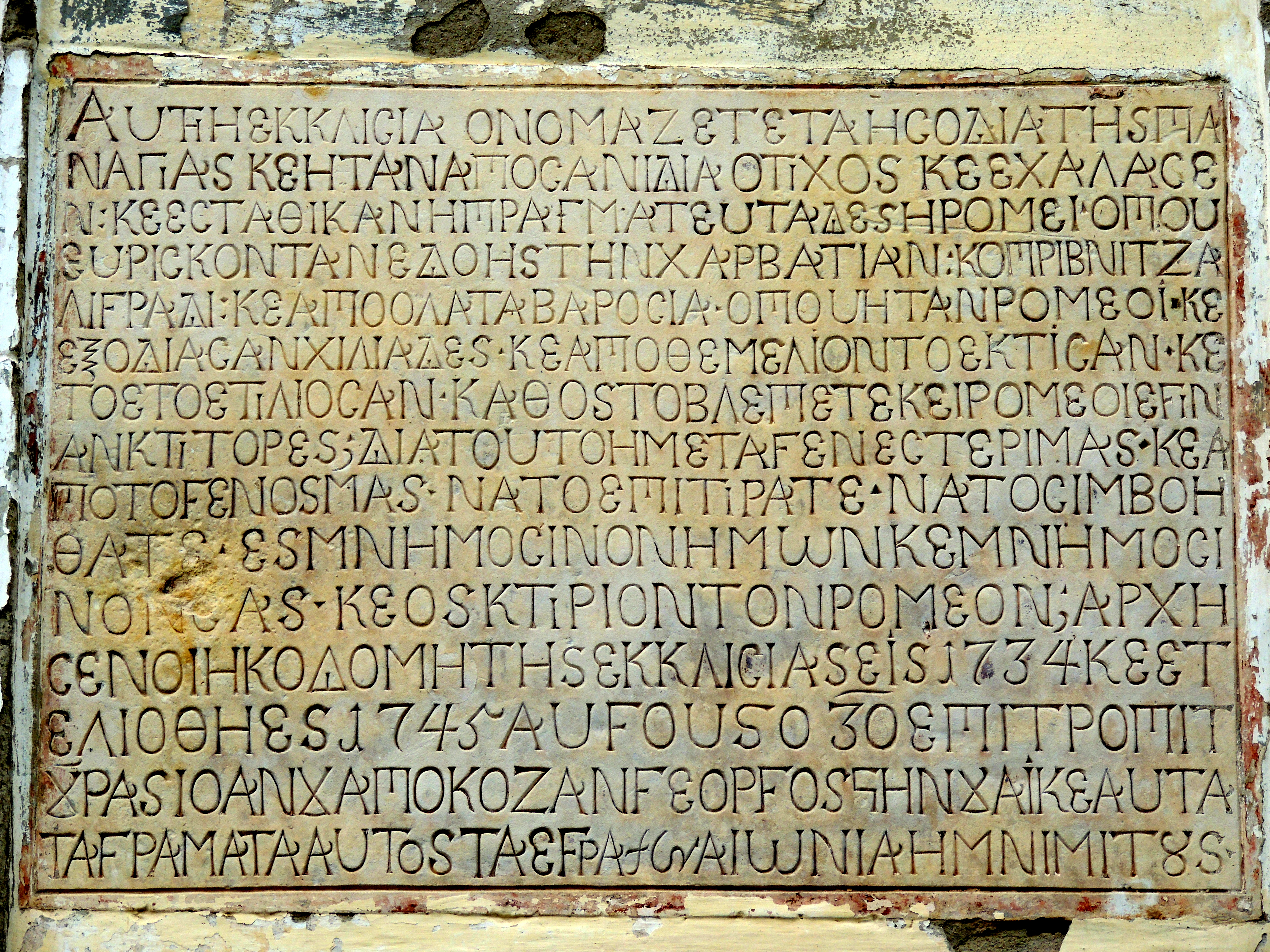 lastra di pietra incisa in occasione della ricostruzione della Chiesa ortodossa di Lepavina (Croazia) avvenuta nel 1734